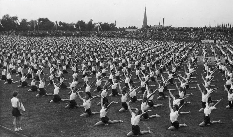 1937 Ósmy ogólnopolski zlot Towarzystwa Gimnastycznego "Sokół" w Katowicach zorganizowany w 70 rocznicę utworzenia sokolstwa polskiego i 15 rocznicę powrotu Śląska do Macierzy Polskiej. Fragment pokazów gimnastycznych.